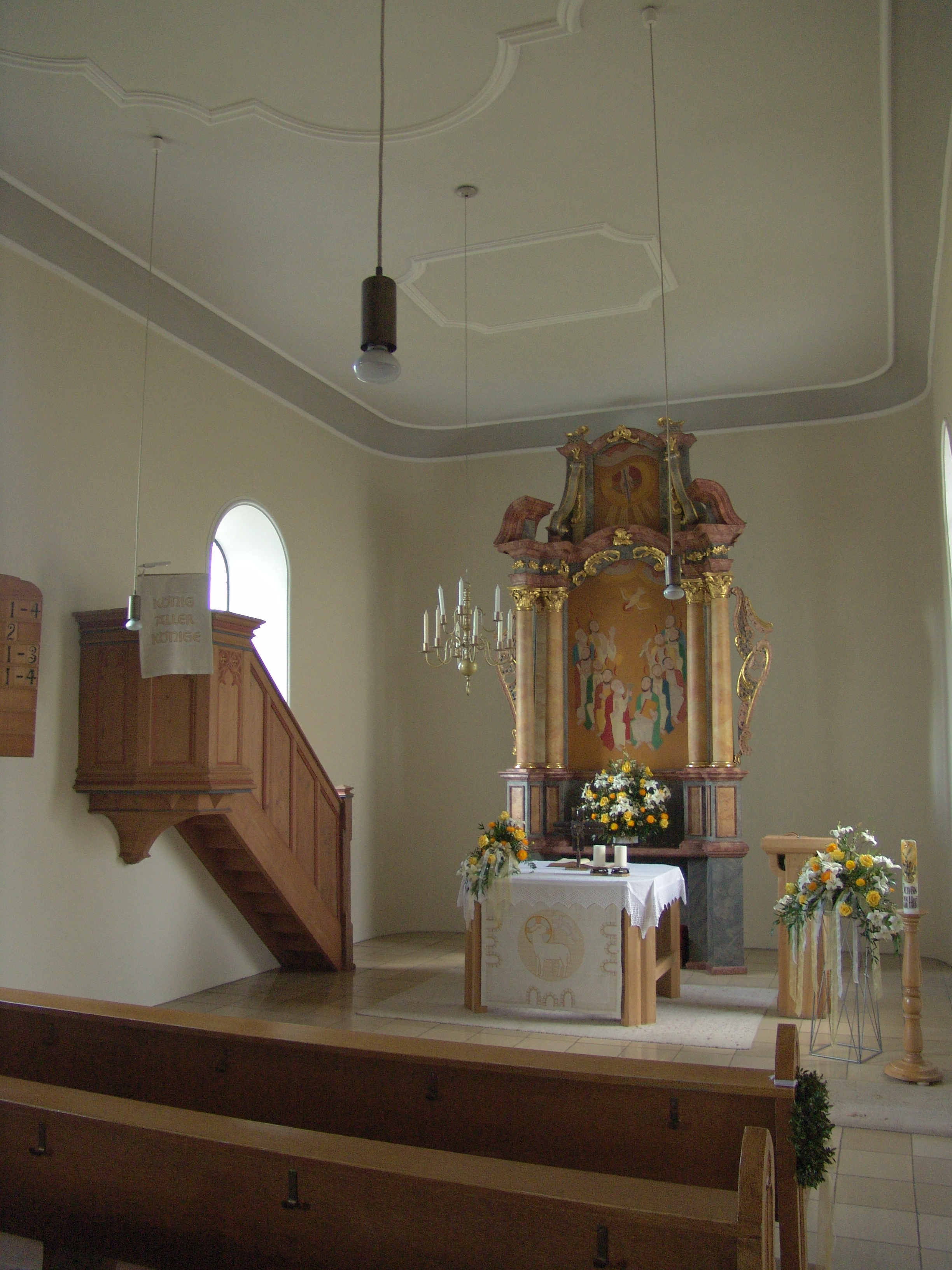 evang.-luth. Kirche St. Leonhard in Schwörsheim